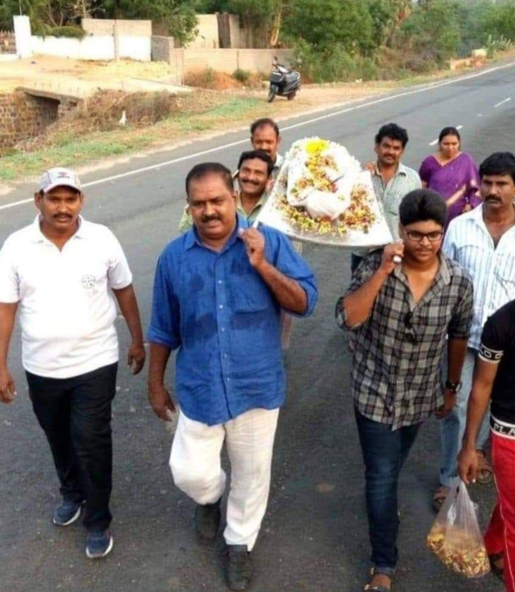 తన బృందంతో అనాథ శవానికి అంత్యక్రియలు నిర్వహిస్తున్న వెంకటరమణ